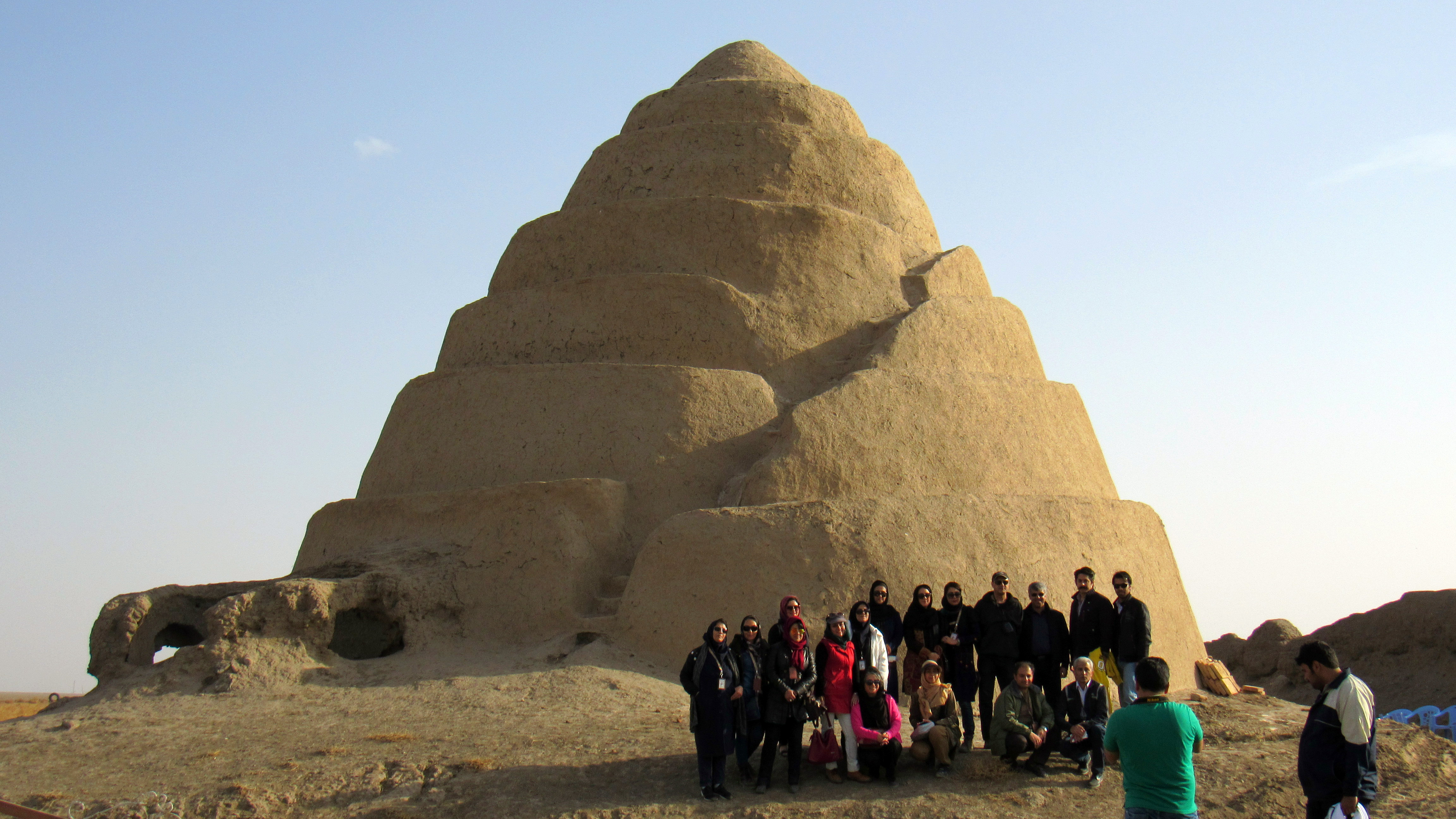 جمعی از گردشگران در کنار یخچال کلانتر زعفرانیه